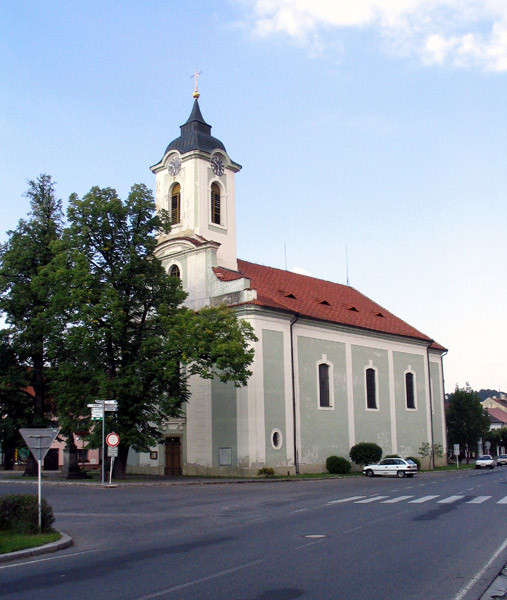 Barokní kostel sv. Vavřince na náměstí v Žebráku.